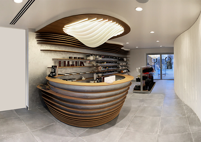 Aldo Coppola Hair Academy